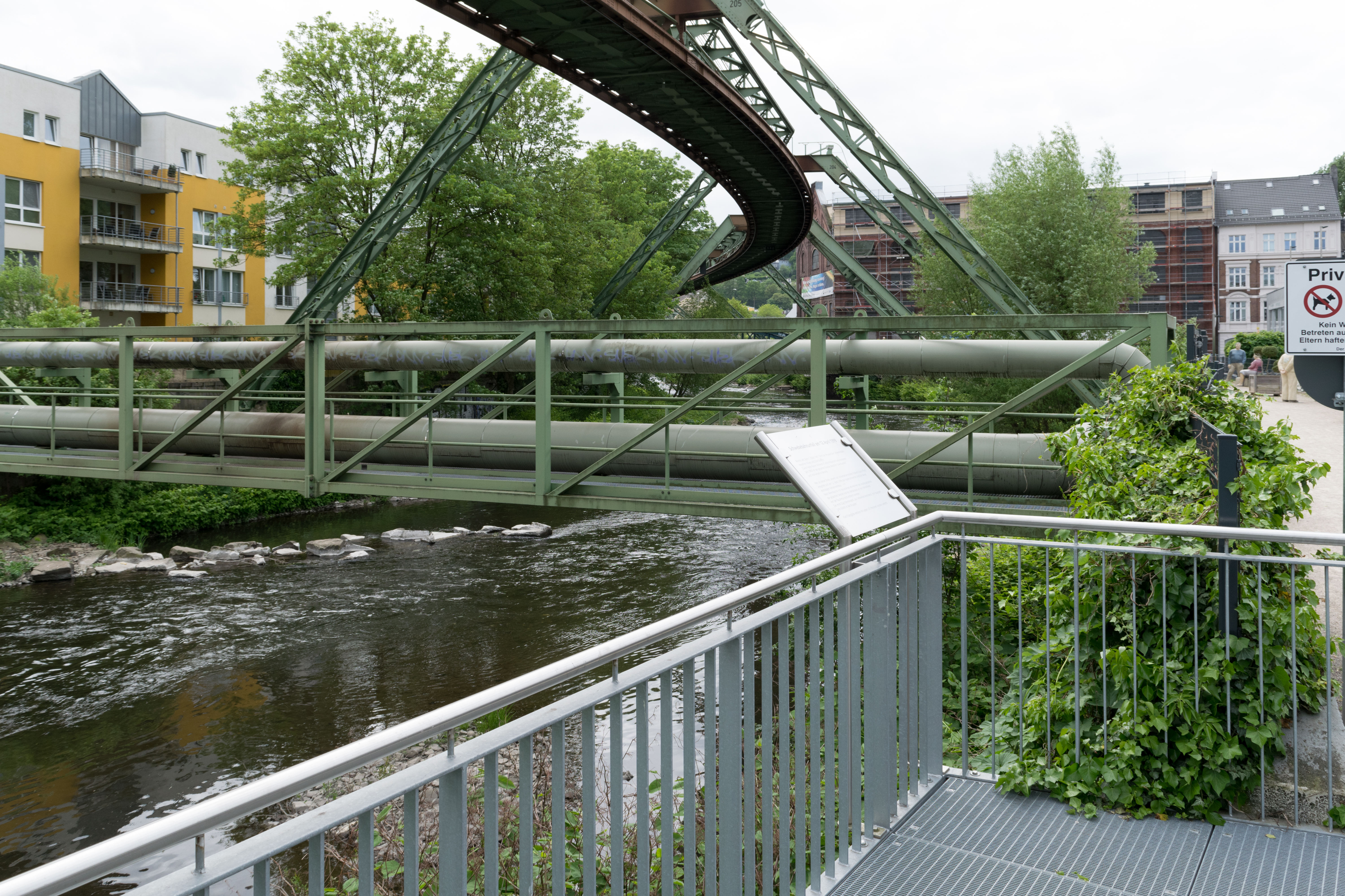 Wupperweg, Wuppertal